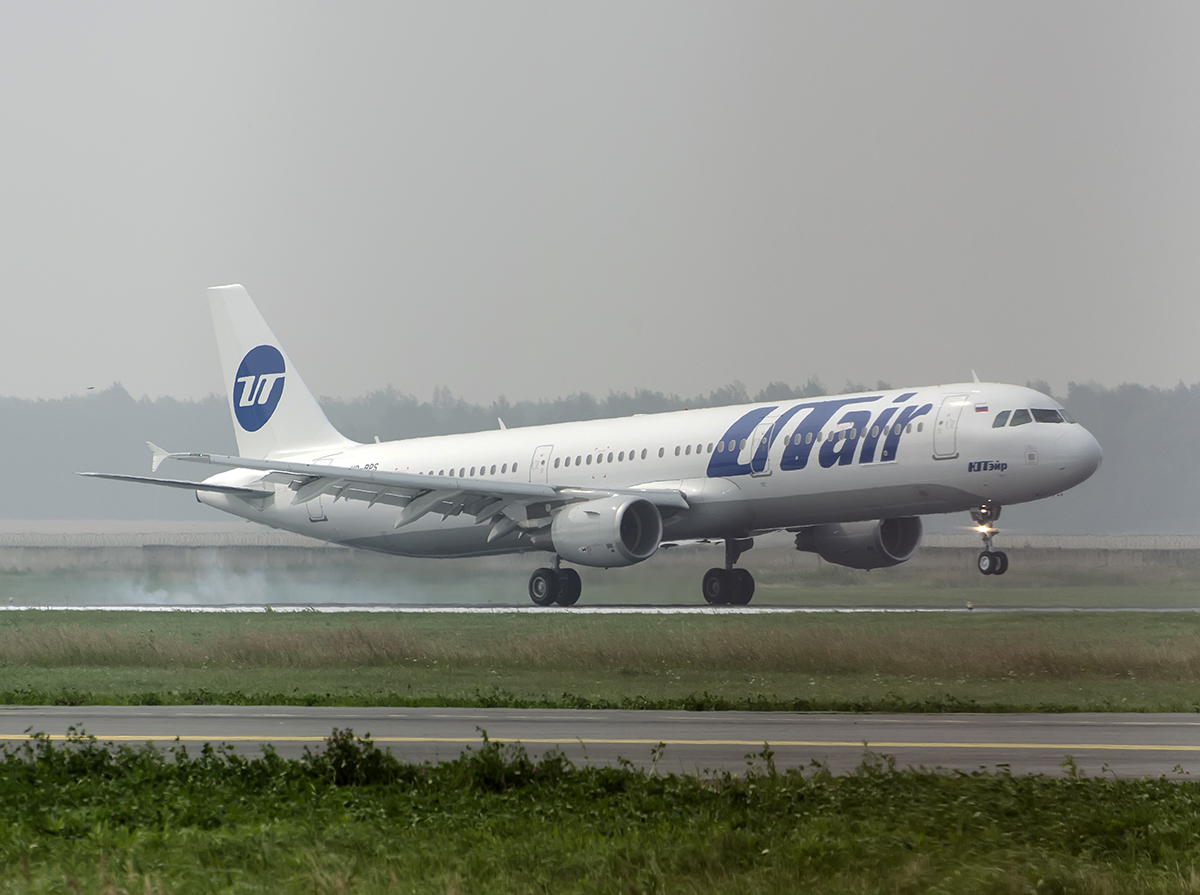 9.08.2013 первый а321 ЮТэйр VP-BPS (cn 5681) впервые выполнил технический рейс в Рощино